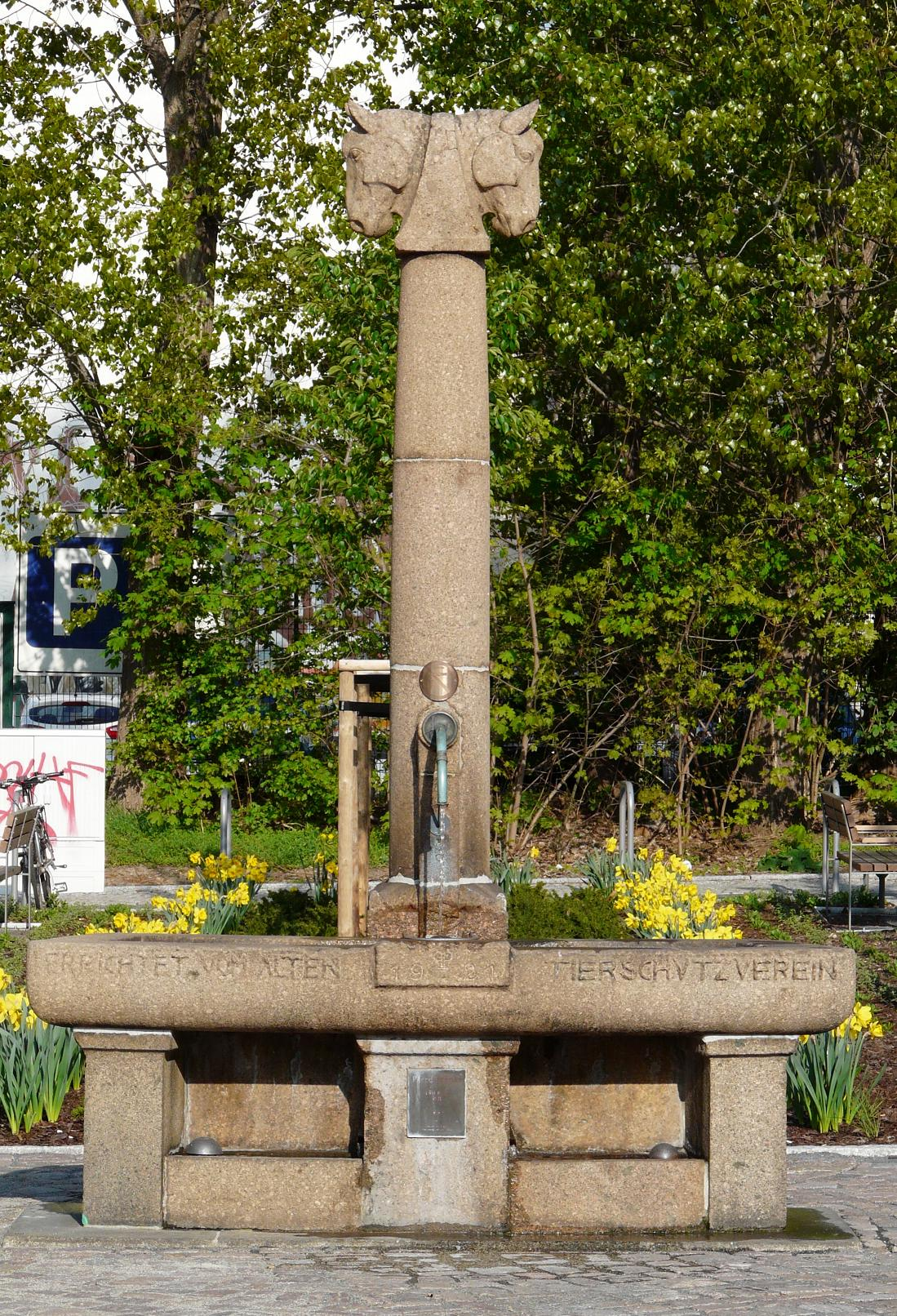 Pferdetränke ("Pferdekopfbrunnen") in Dresden (Bautzner Straße/Holzhofgasse), Architekt: Paul Polte, Baujahr: 1921